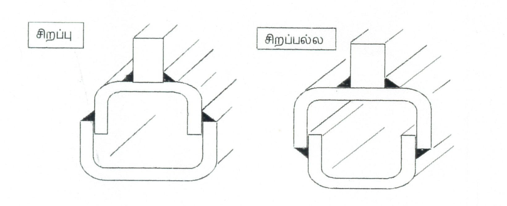 பாகங்களை இணைக்கும்போது